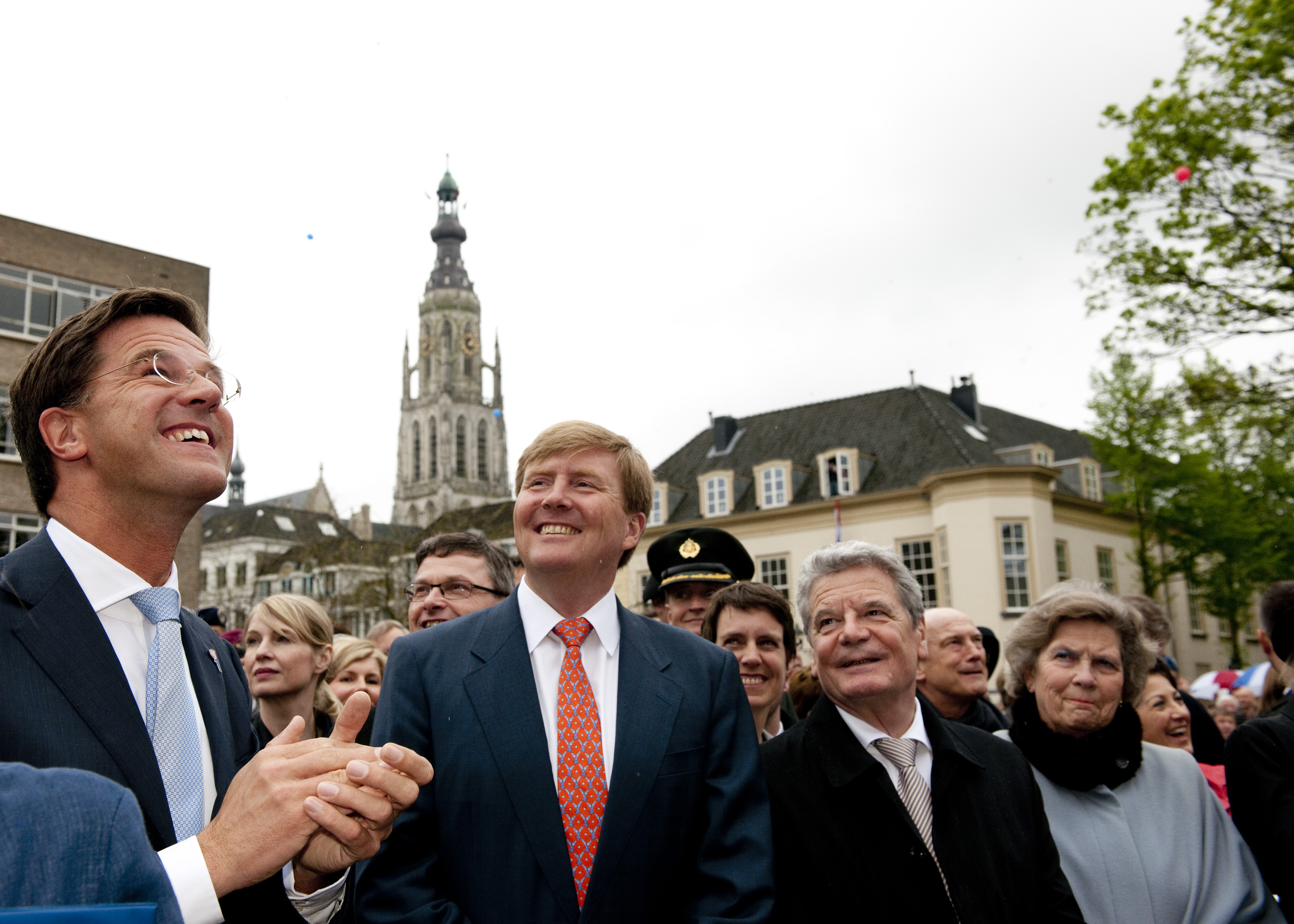 Minister-president Rutte, de Prins van Oranje, bondspresident Gauch en voorzitter van het Nationaal Comité 4 en 5 mei Mw. Leemhuis-Stout luisteren op Bevrijdingsdag naar het optreden van Guus Meeuwis in Breda.